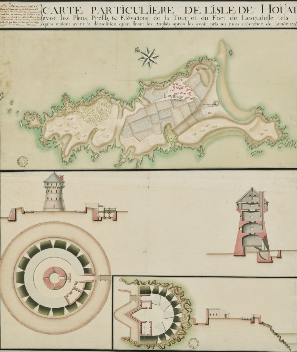 Carte particuliere de l'Isle de Houat avec les plans, profils & elévations de la tour et du fort de Lescudelle tels quils etoient avant la démolition qu'en firent les anglais après les avoir pris au mois d'octobre de l'année 1746